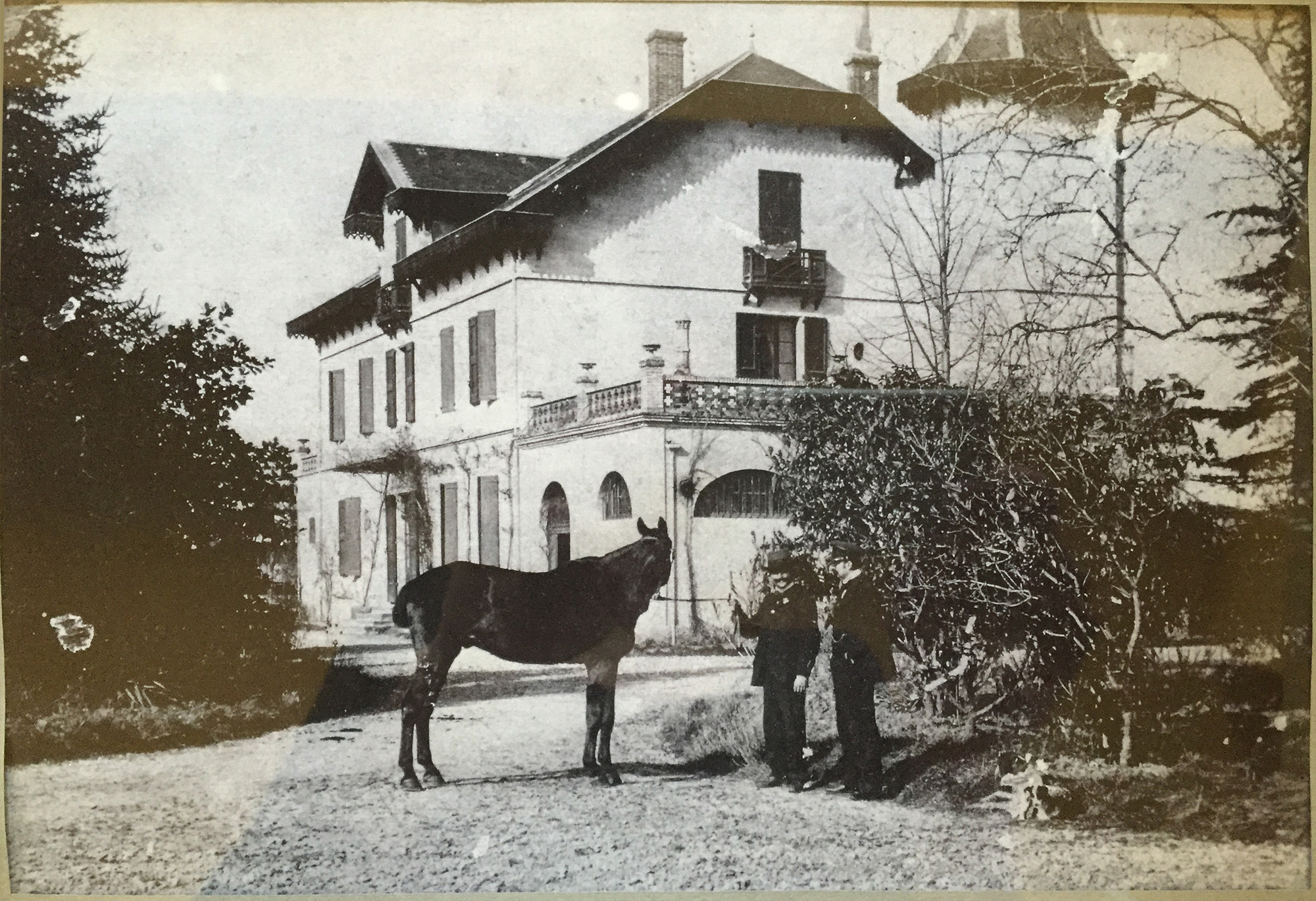 Le Domaine du Buc au début du XXème Siècle